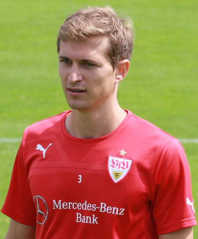 Daniel Schwaab beim VfB-Training. Aufgenommen von